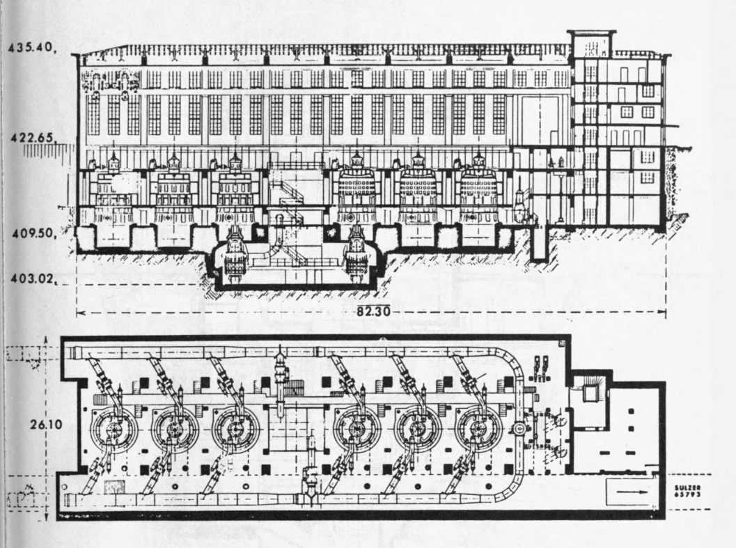 Längsschnitt und Grundriss Maschinenhaus Altendorf SZ. Zustand vor 1973, wo die siebte Turbine eingebaut wurde. Unter den Maschinensätzen 3 und 4 sind die Pumpen sichtbar.